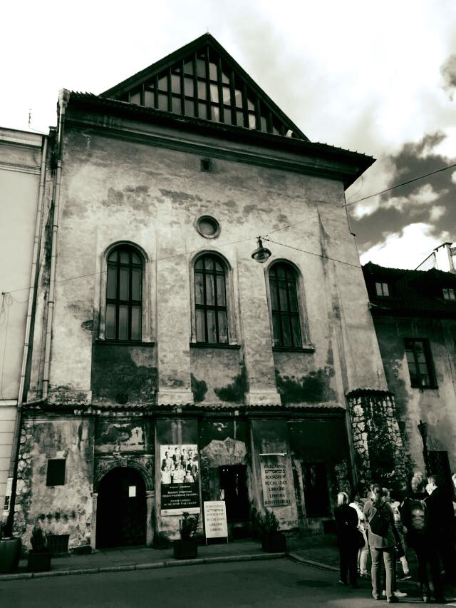 Vysoká synagoga v Krakově, stav květen 2016.